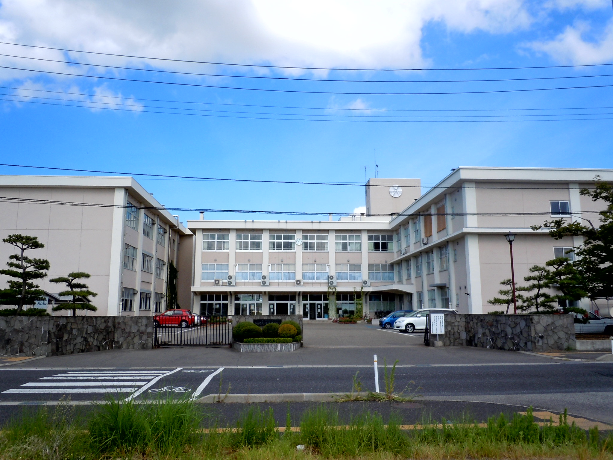 新潟県立新潟向陽高等学校